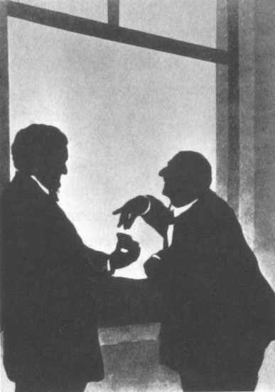 Silhouet Anton Bruckner en geknipt door Otto Boehler in Bayreuth